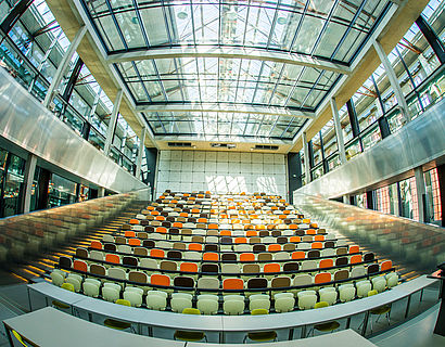 Fotograf: Matthias Friel